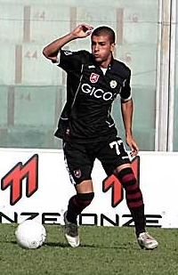 Alessio Sestu